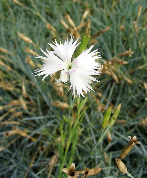 Dianthus plumarius" (œillet mignardise) Photo prise en août 2004 au parc botanique de Meise (Belgique) Jean Tosti 08/2004